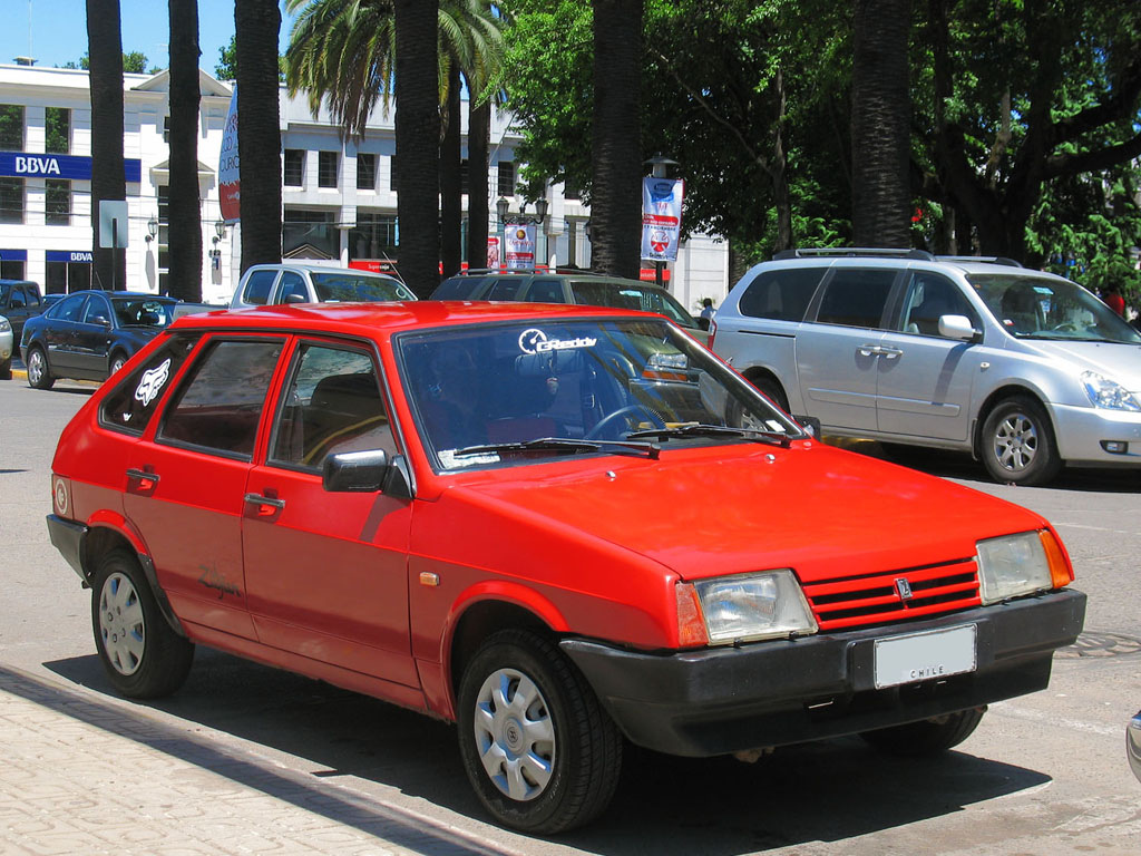 Lada 21093 Samara 1500 S 1995